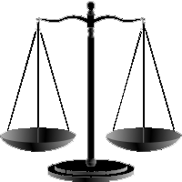 Esta imagem foi alterada a partir do Scale_of_justice.svg de autoria de Usuário:cosmogoblin, também sob CC-BY-SA 3.0.